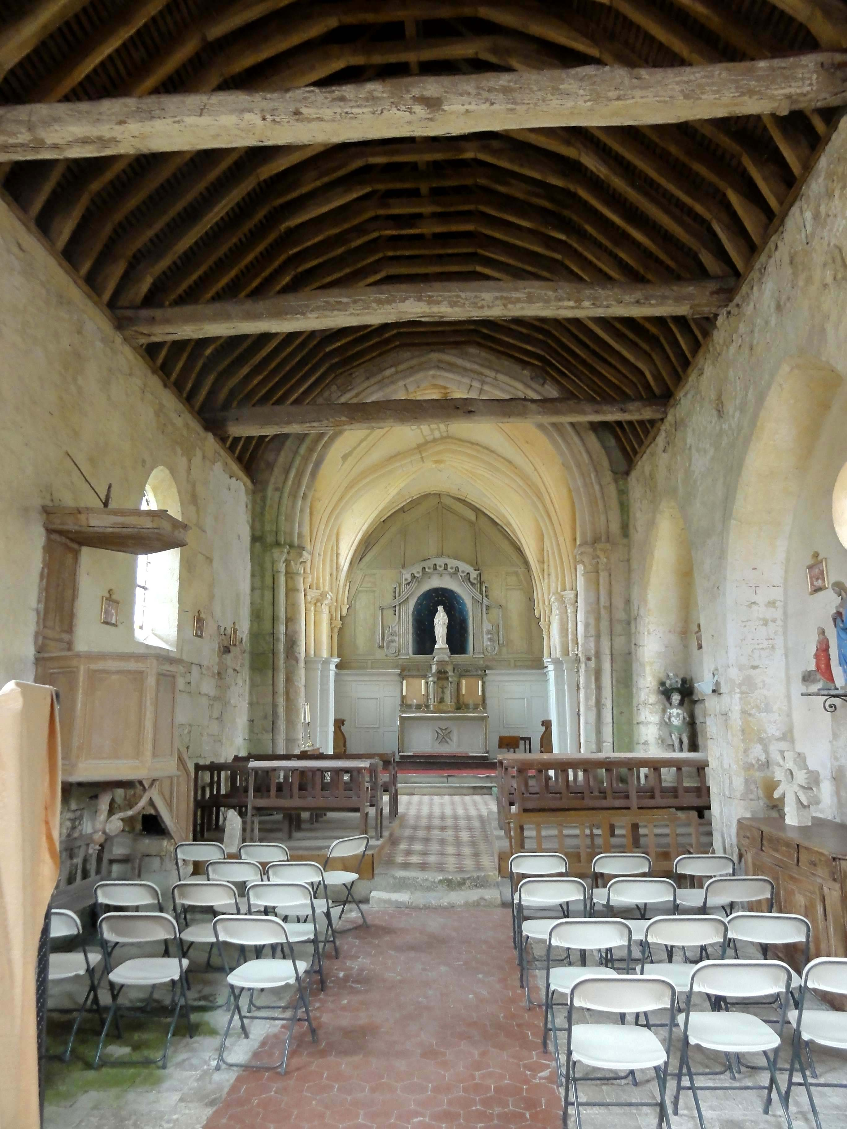 Voir titre.